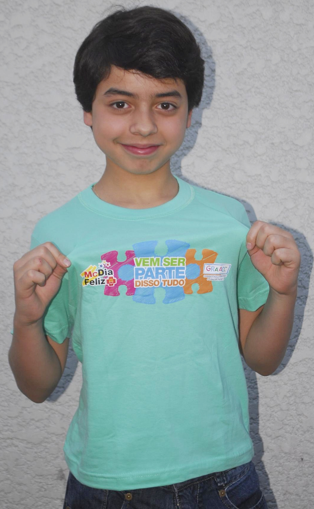 Gustavo Daneluz no McDia Feliz de 2012.